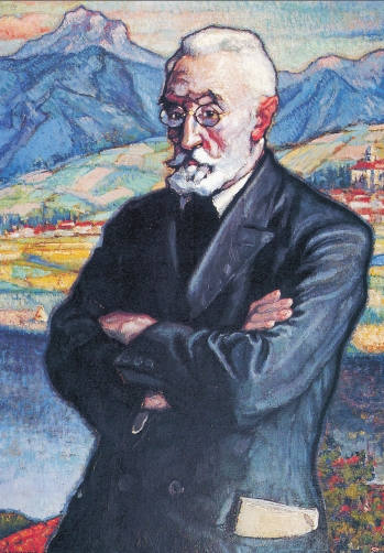 Migel_Unamuno,_1926,_A._Martiarena.